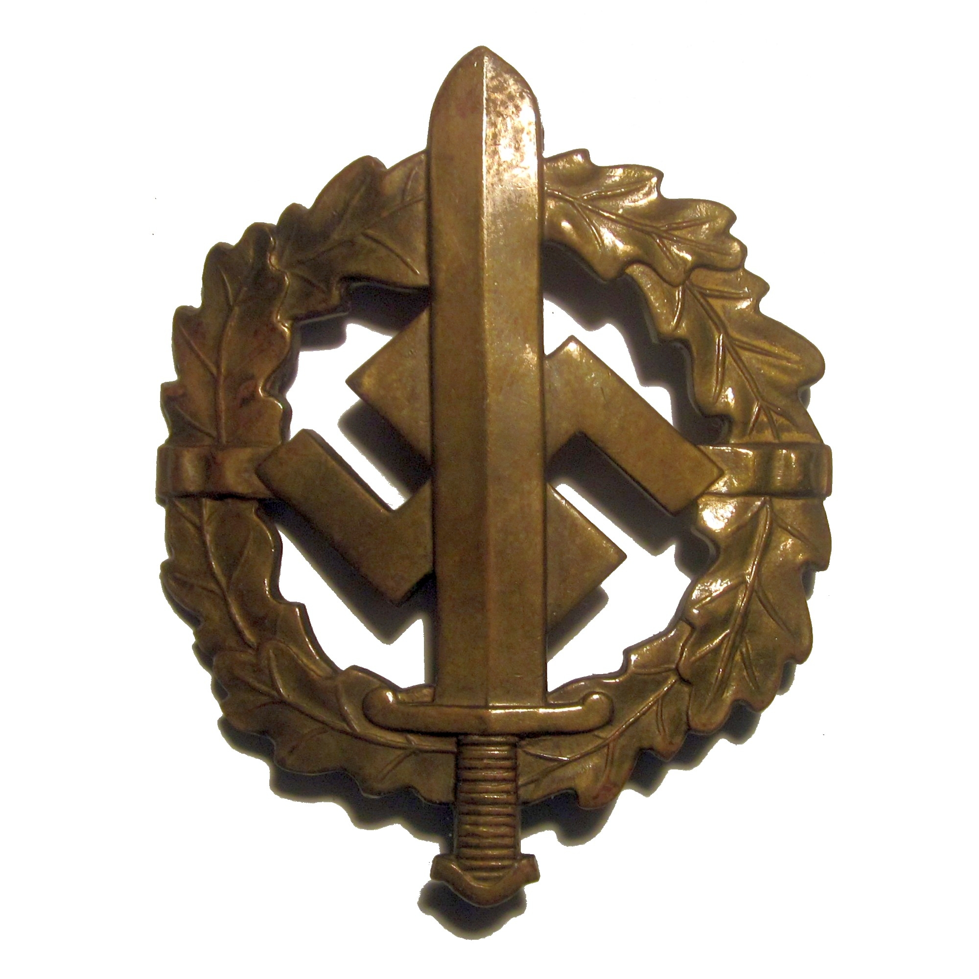 SA Sportabzeichen in Bronze